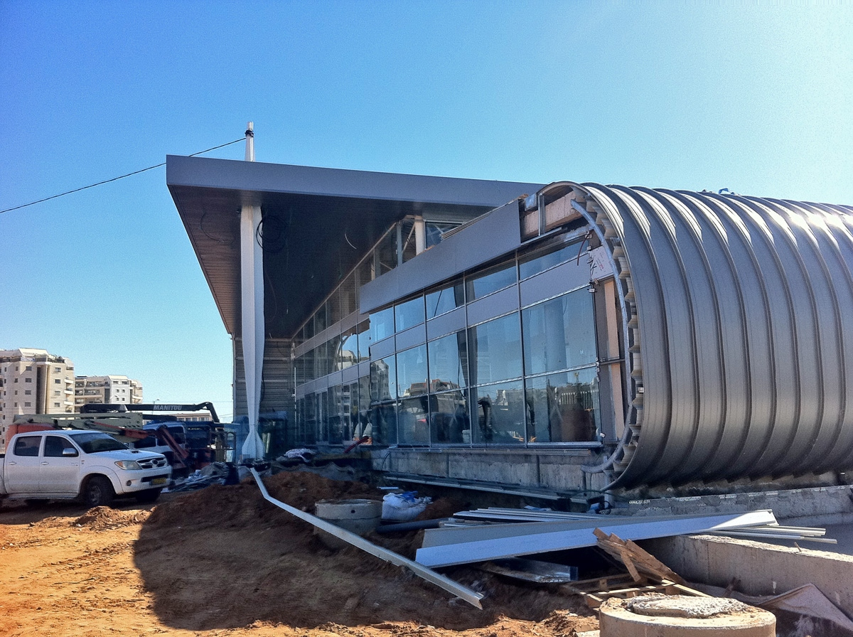 7מבנה תחנת רעננה מערב